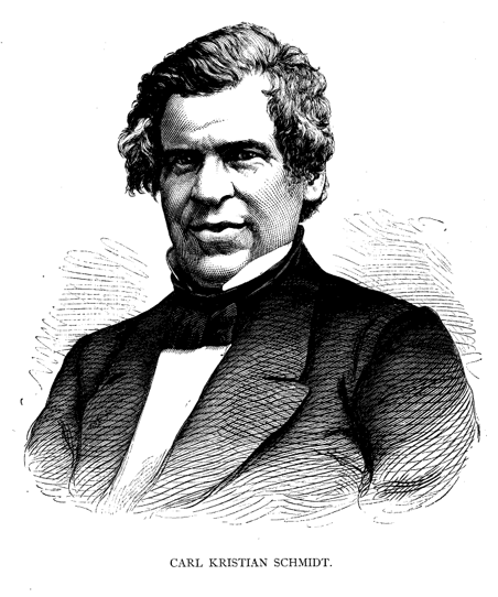 Karl Kristian Schmidt